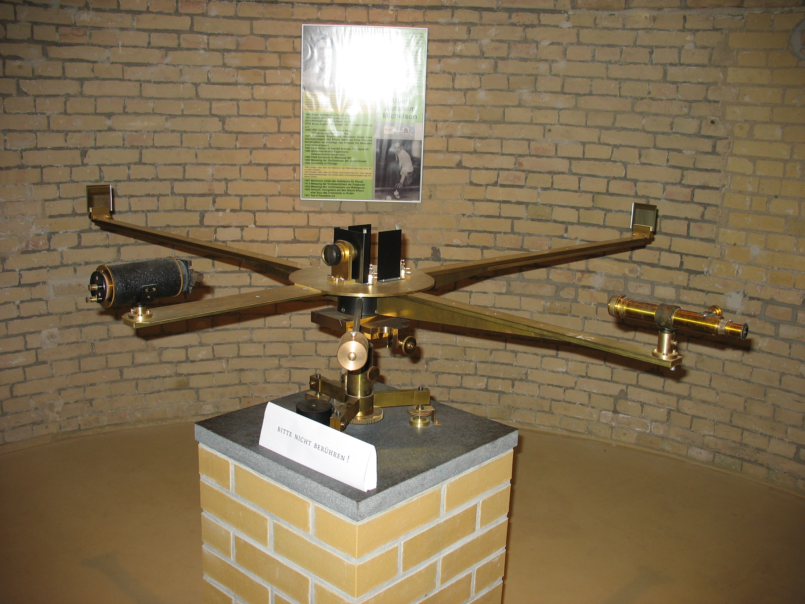 Michelson-Morley-Experiment: Historischer Nachbau im Michelson Keller des Michelsonhauses am Telegraphenberg in Potsdam (Originalaufbau existiert nicht mehr).